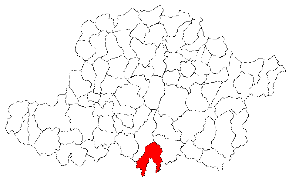 Categorie:Hărţi ale judeţului Arad